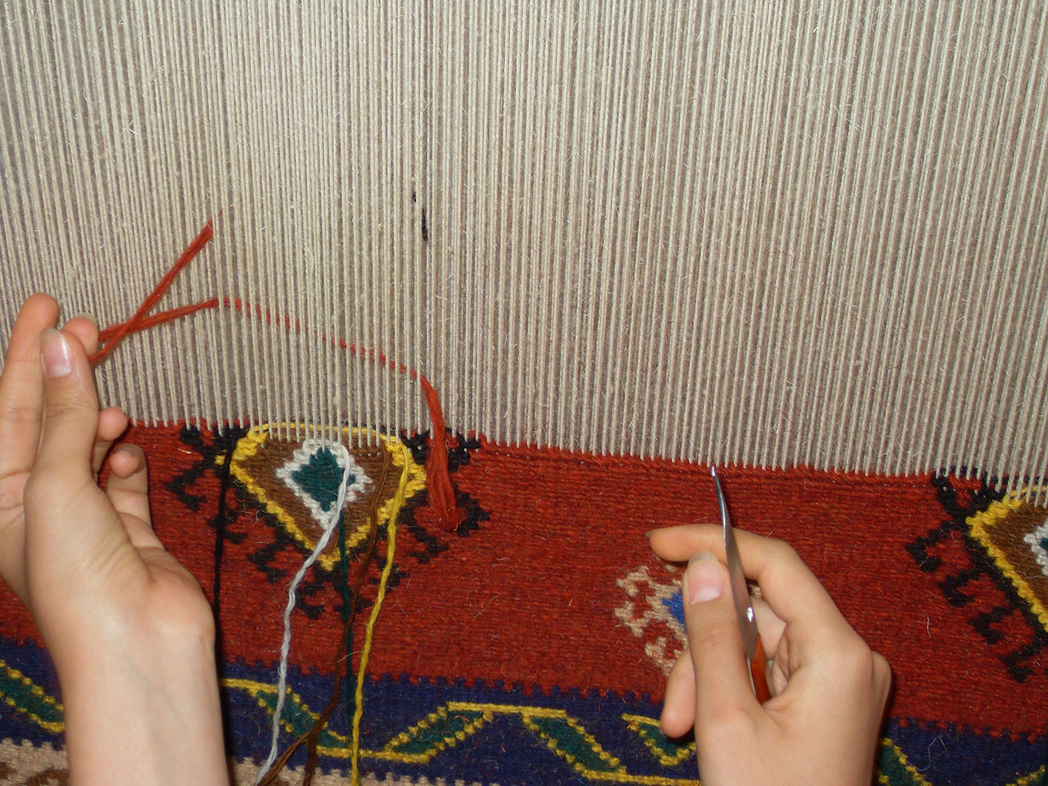 گلیم دستباف